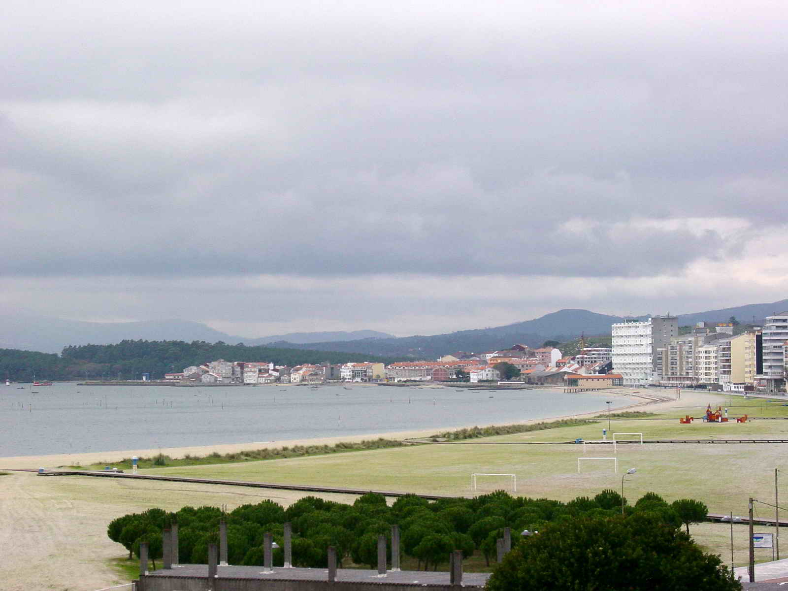 Praia (playa, beach) "Compostela" - Vilagarcía - Galicia - Spain